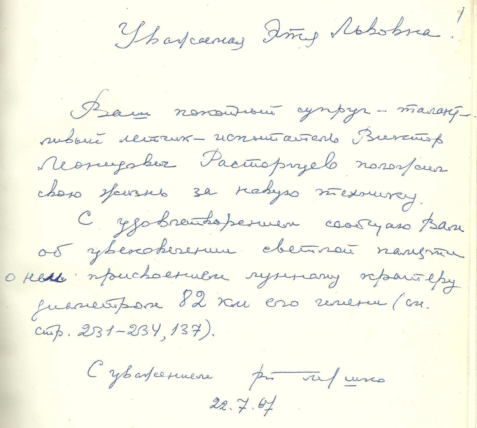 Подпись Глушко на лунном атласе, подаренном вдове летчика